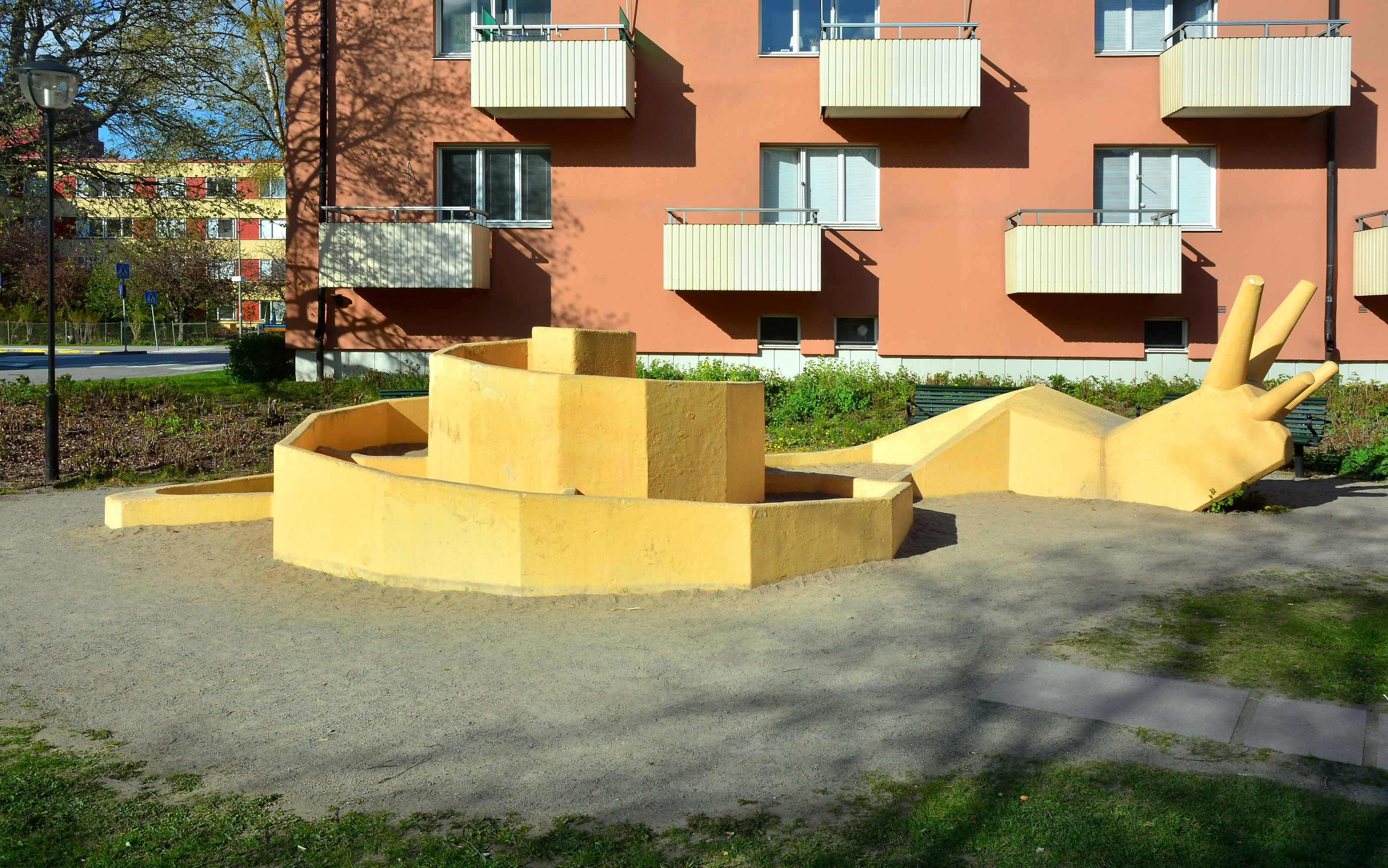 Snigelparken i Årsta i södra Stockholm.